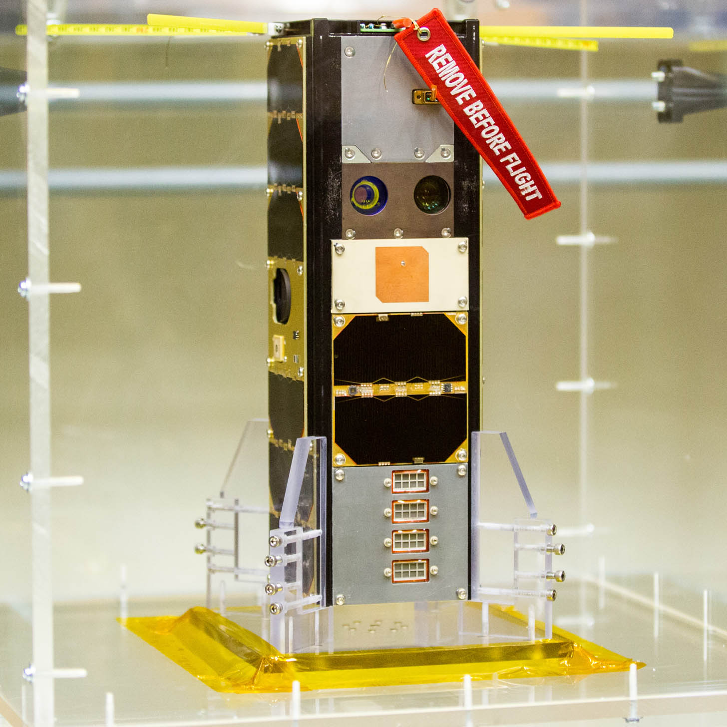 Aalto-1-satelliitin lentomalli